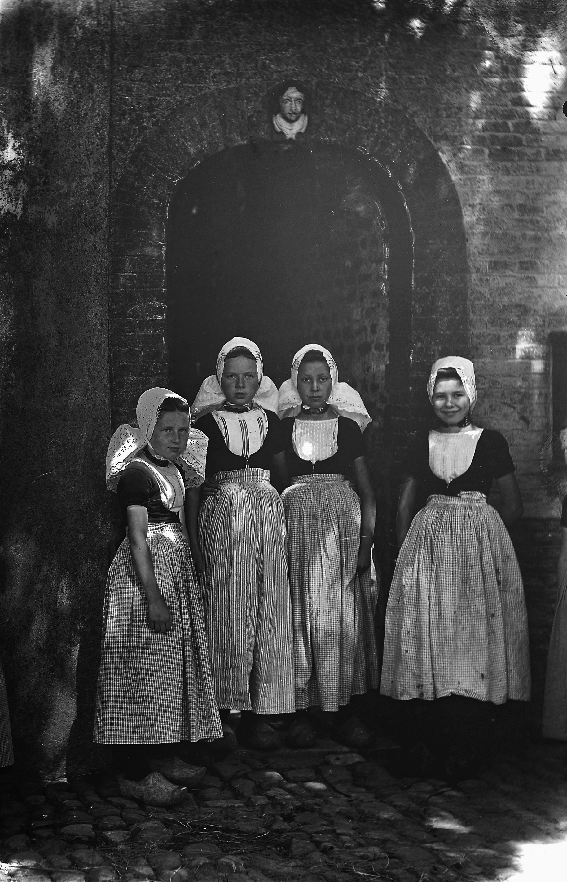 Streekdracht: Meisjes in Walcherse dracht voor poortje This is a possible Rijksmonument: Find the monument in the Monuments database: in Unknown All Rijksmonumenten in Unknown Is this a Rijksmonument? Yes No More information about this project and help. More images to work at in Category:Possible Rijksmonumenten.